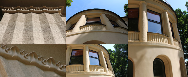 Die unter Denkmalschutz stehende Villa Hahn wurde 1923 von dem Architekten Eugen Weber in Chemnitz erbaut. Die Villa Hahn ist ein Bestandteil des gesamten historischen Villenensembles des Chemnitzer Stadtteiles Kapellenberg, dem ehemaligen „Stollberger Viertel“, wie dieses Gebiet einst genannt wurde. Hier siedelten sich um 1900 viele wohlhabende Chemnitzer Bürger an.